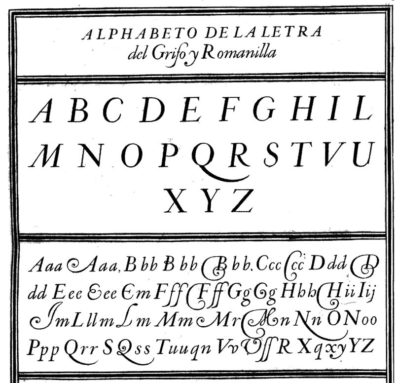 Fragmento de página de José de Casanova en Primera parte del arte de escrivir todas formas de letras sobre la letra Grifa.